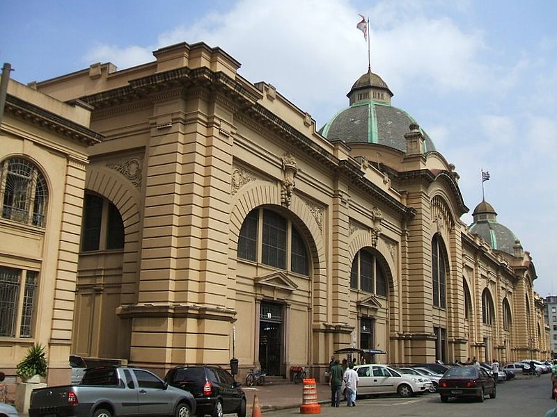 Mercado Municipal de São Paulo, fachada da Rua da Cantareira, São Paulo, Brasil.